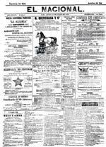 Portada de un número del diario El Nacional. Lima, 1901.